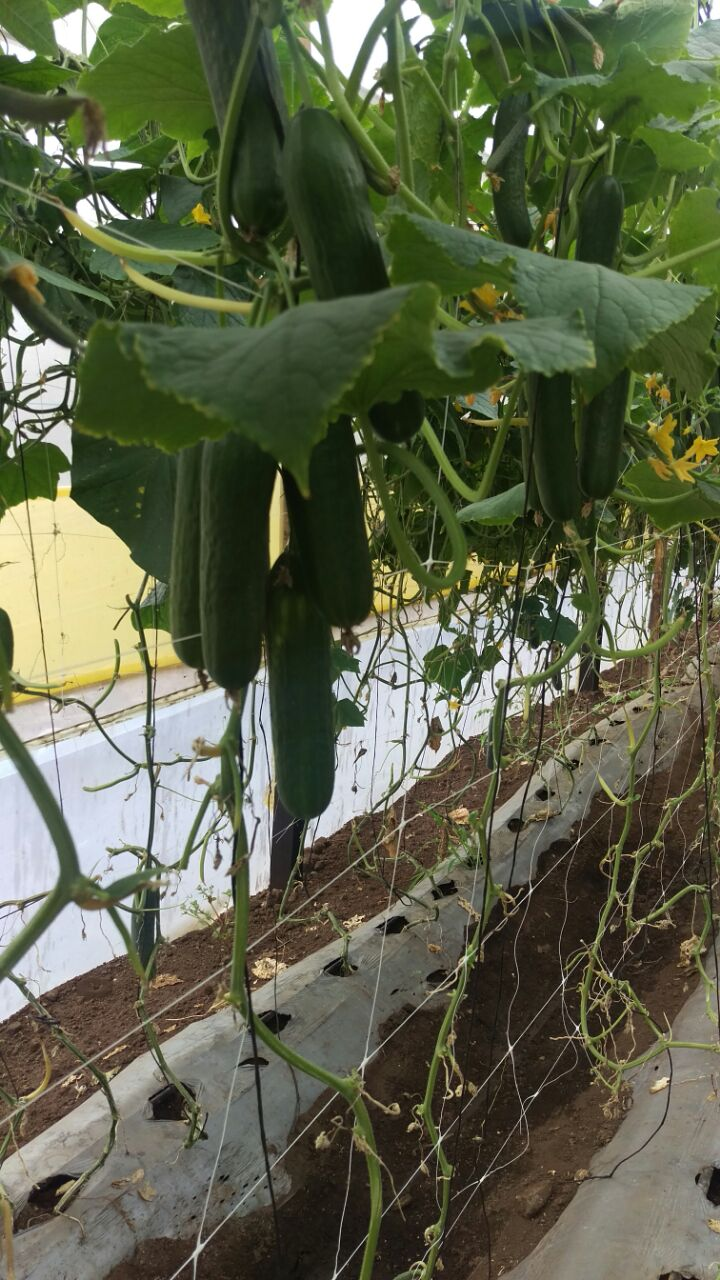 Los cultivos modernos de pepino utilizan un sistema de soporte aéreo tipo la malla para entubaron porque mejora la aireación y reduce los patógenos, ademas de permitir una coloración uniforme del fruto